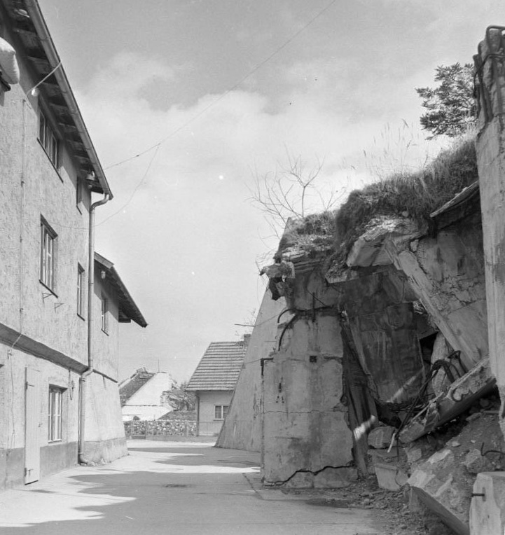 Neu-Gablonz bei Kaufbeuren/Schwaben Gesprengte Bunker, Hallen, letzte Baracken der früheren Munitionsfabrik, auf deren Gelände"Neu-Gablonz" entstand.